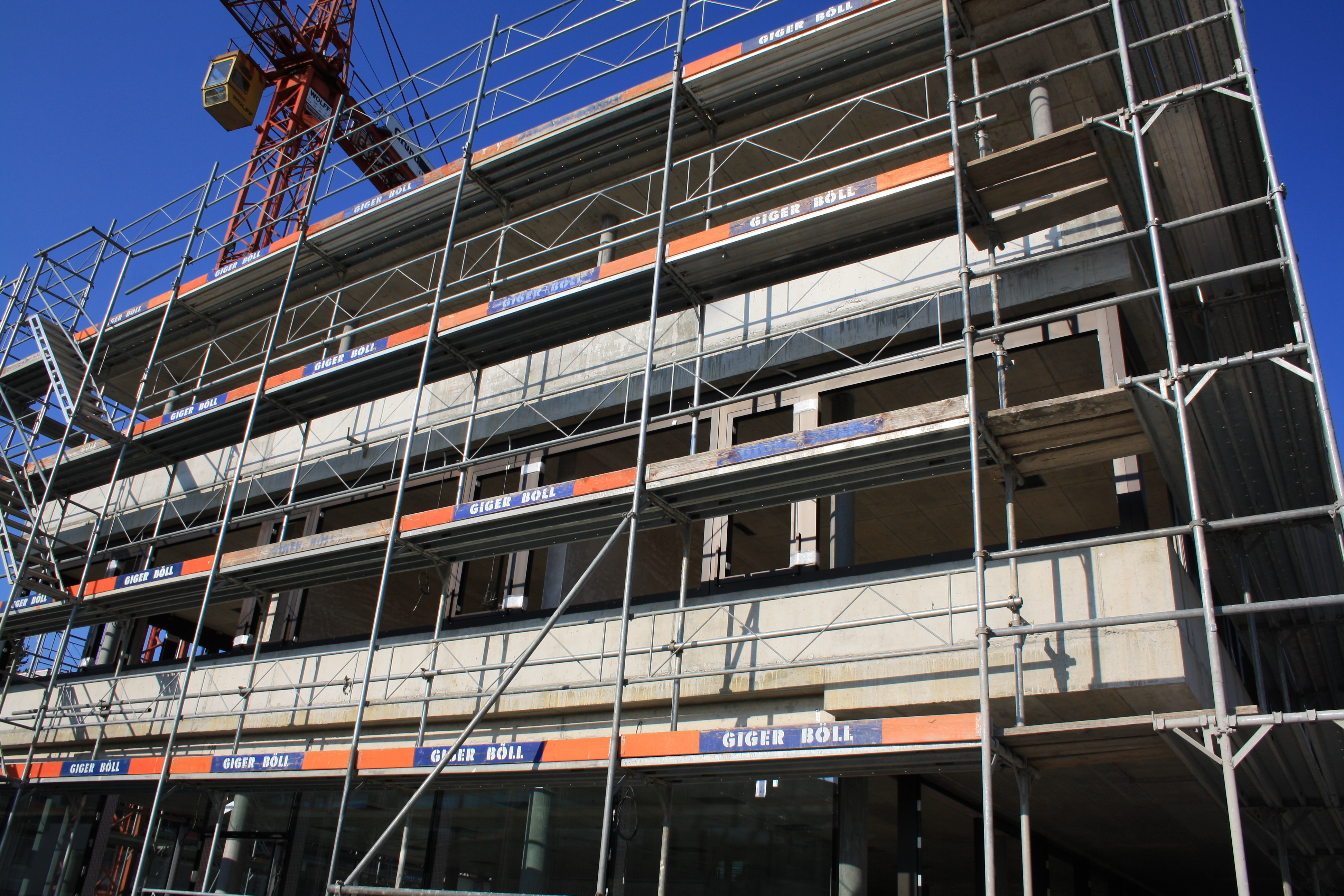 Neues Verwaltungsgebäude der Reformierten Landeskirche Aargau in Aarau im Rohbau